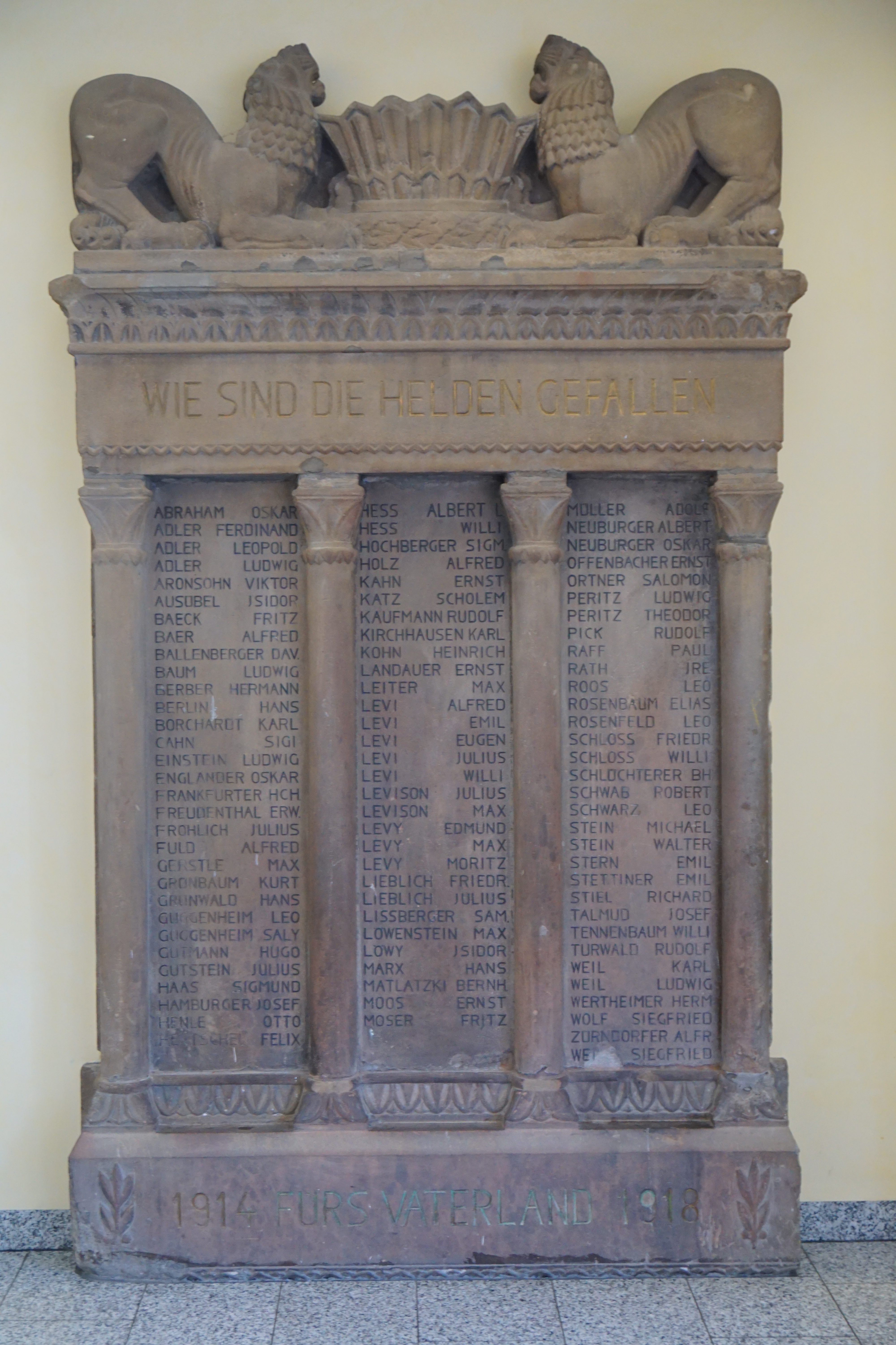 Synagoge und Gemeindezentrum Hospitalstraße, Denkmal für die Gefallenen des 1. Weltkriegs von Josef Zeitler, Sandstein, Höhe 250 cm, 1922.